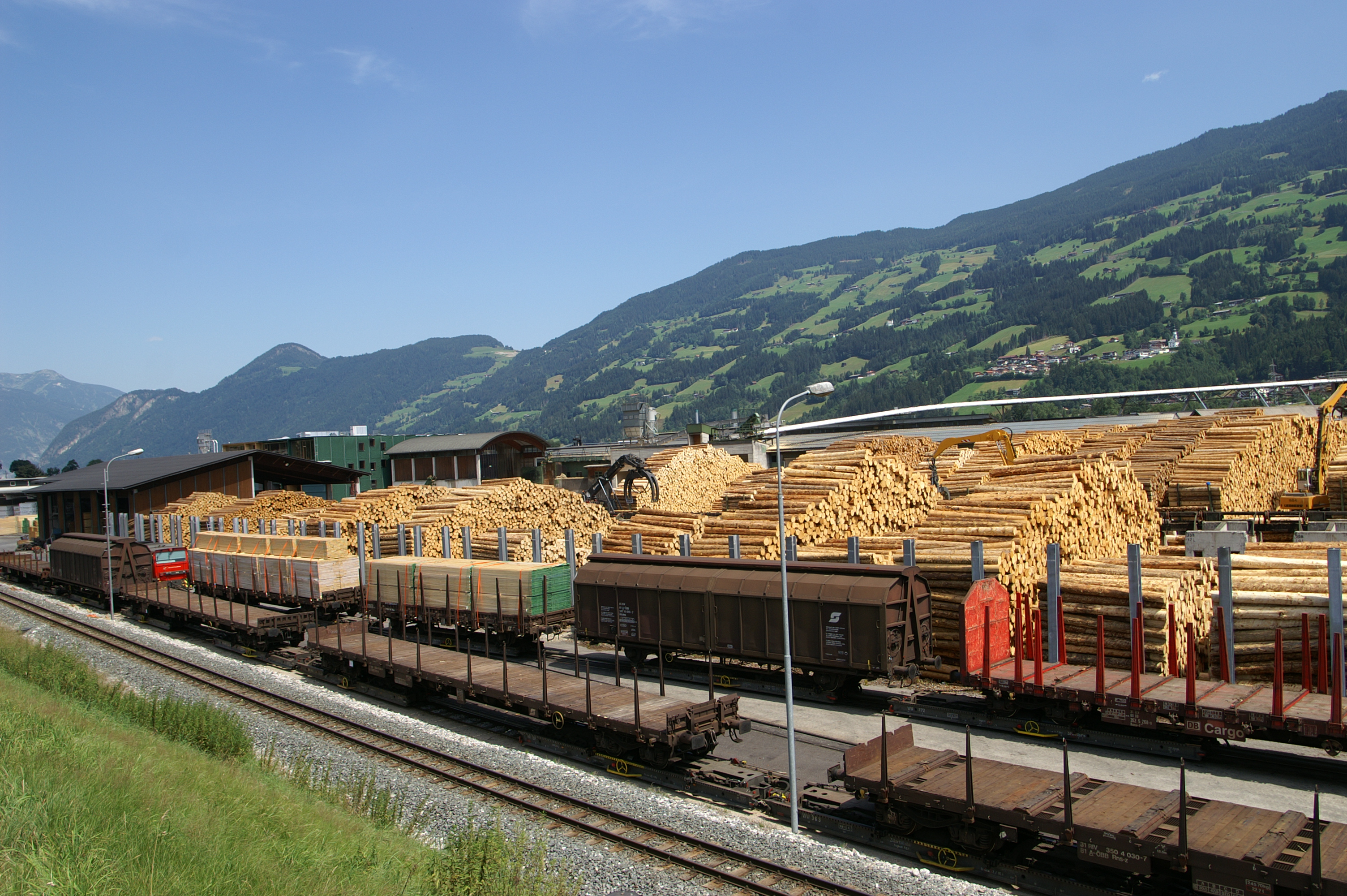 Holz Binder, Fügen im Zillertal, Tirol